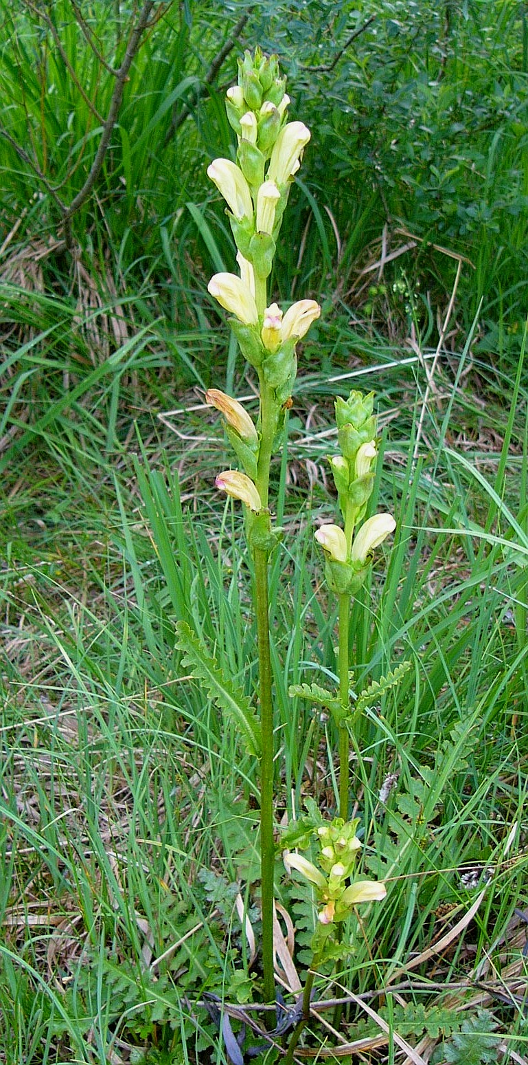 Karlszepter Habitus